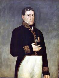 Retrato de José de Larrea y Loredo por José Gil de Castro.